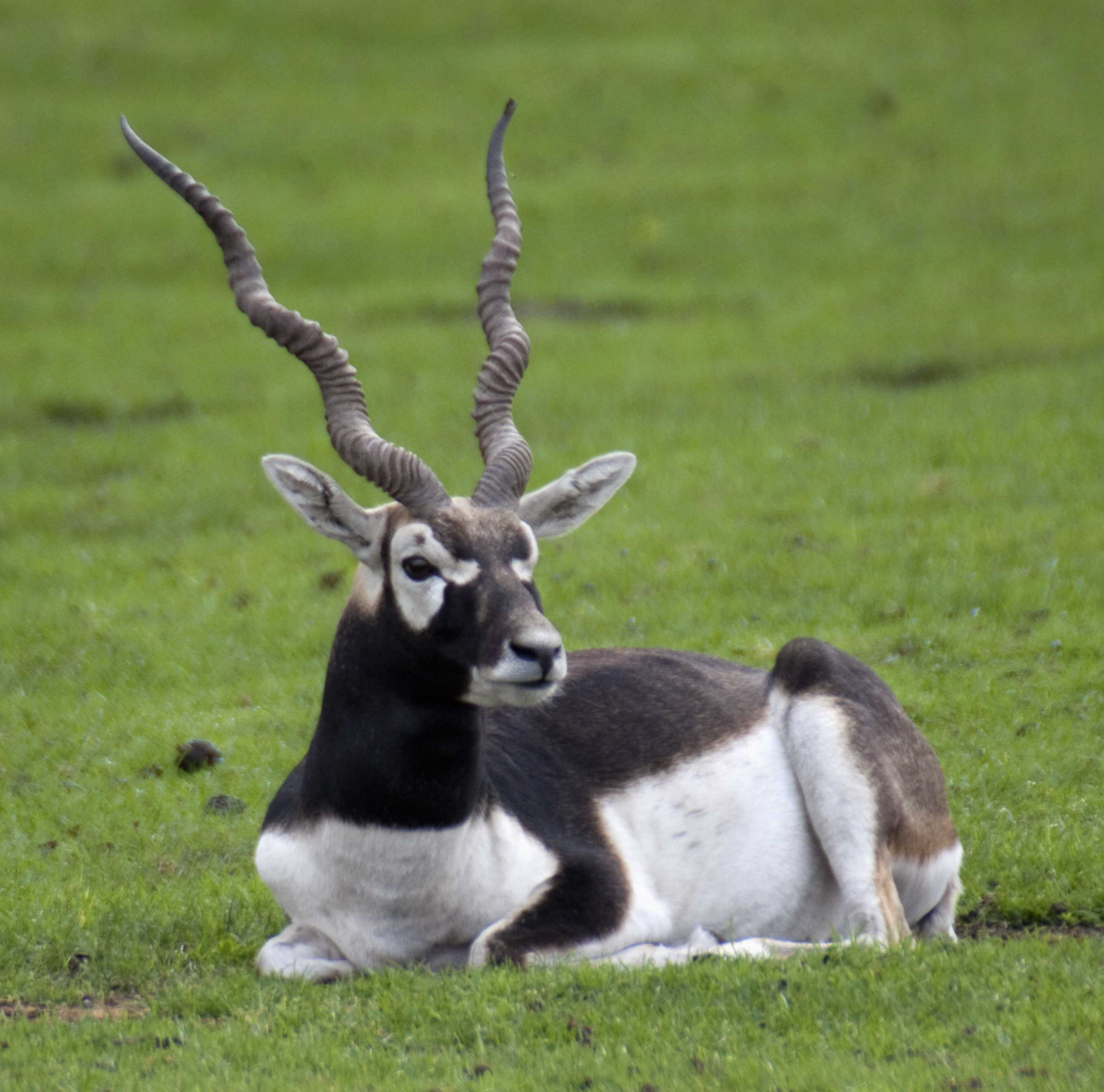 Blackbuck male